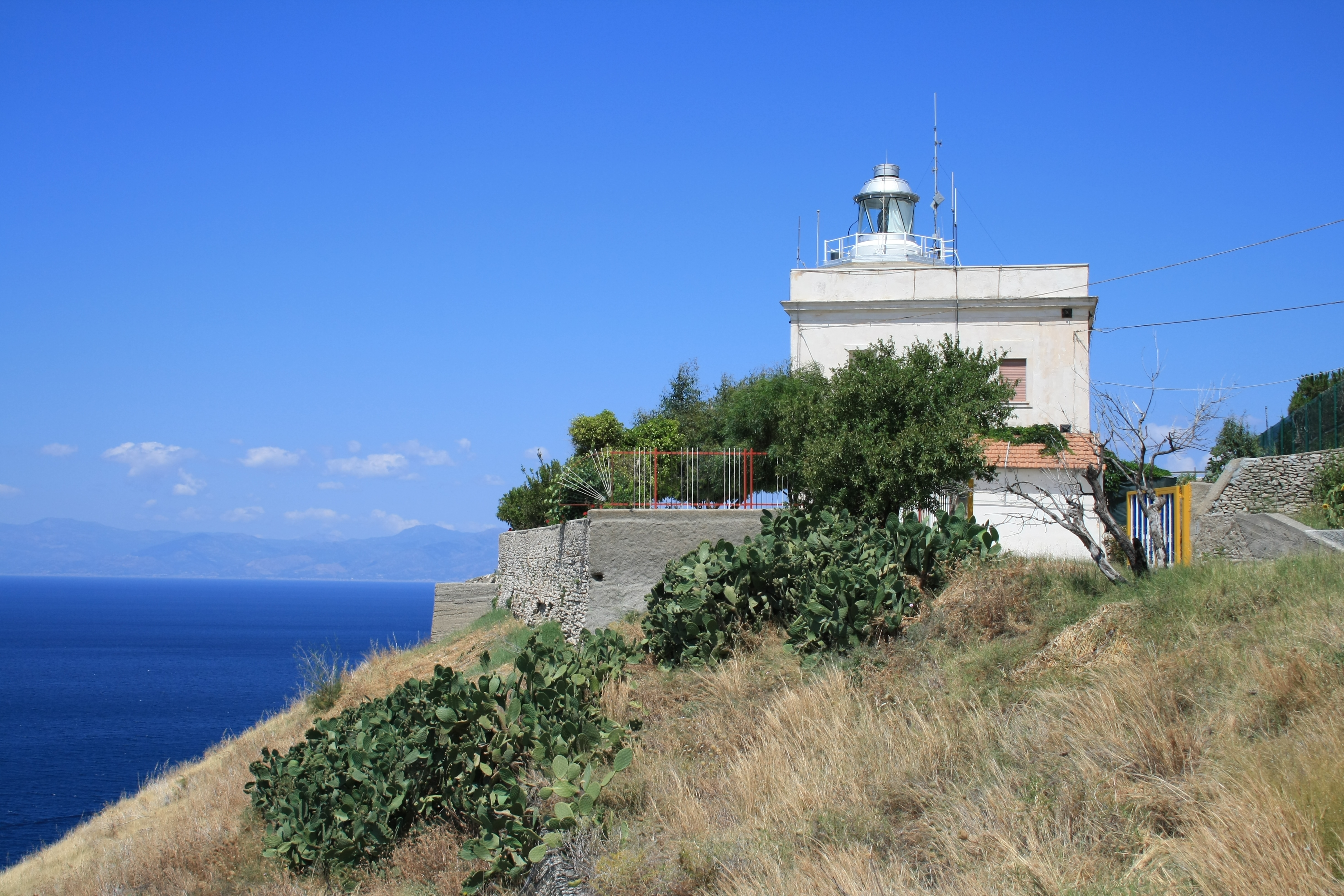 Il faro di Capo D'Armi (Motta San Giovanni) Italy.